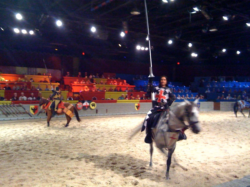 Phil